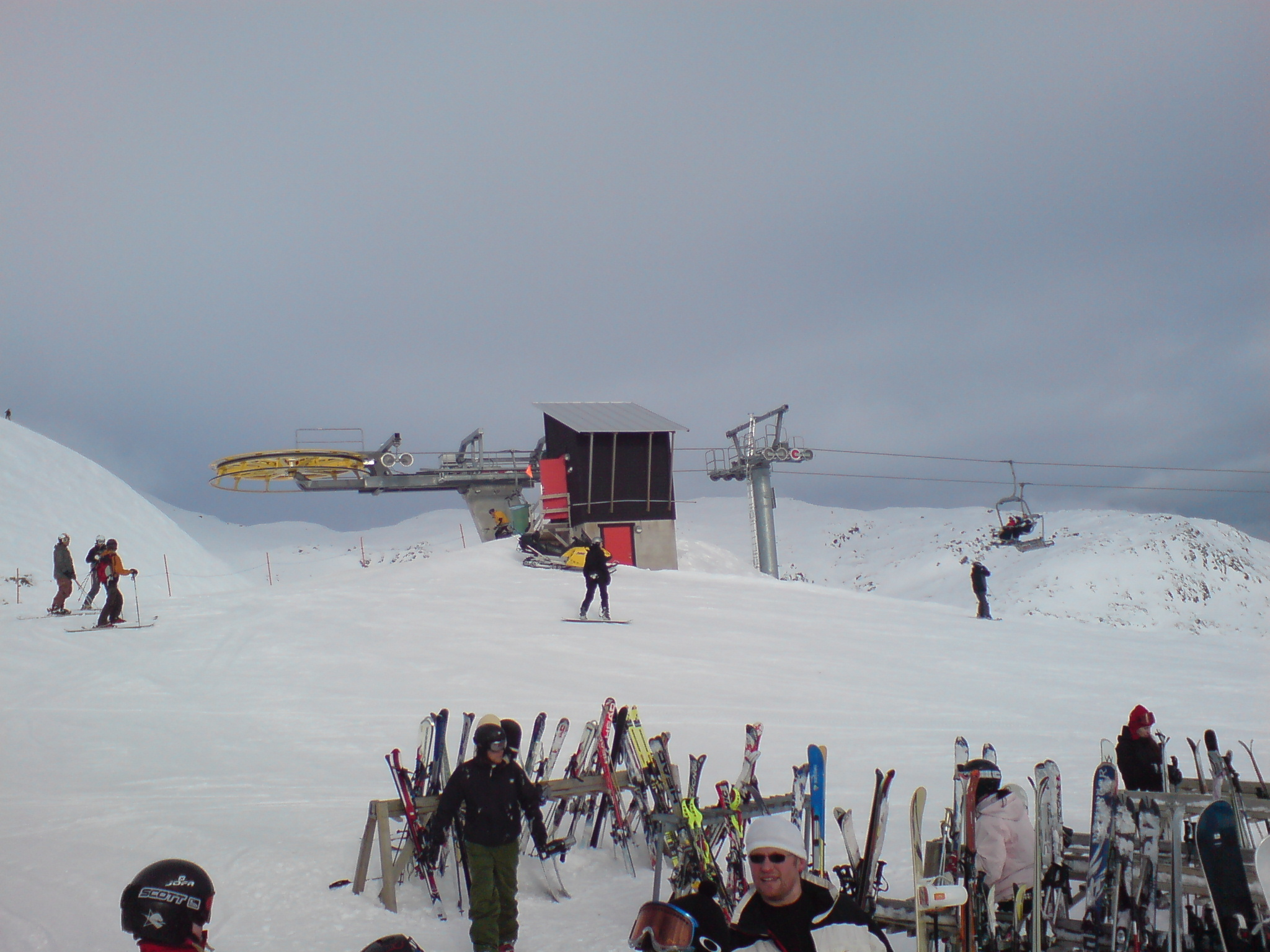 Hummelliften Mountain station in Åre.